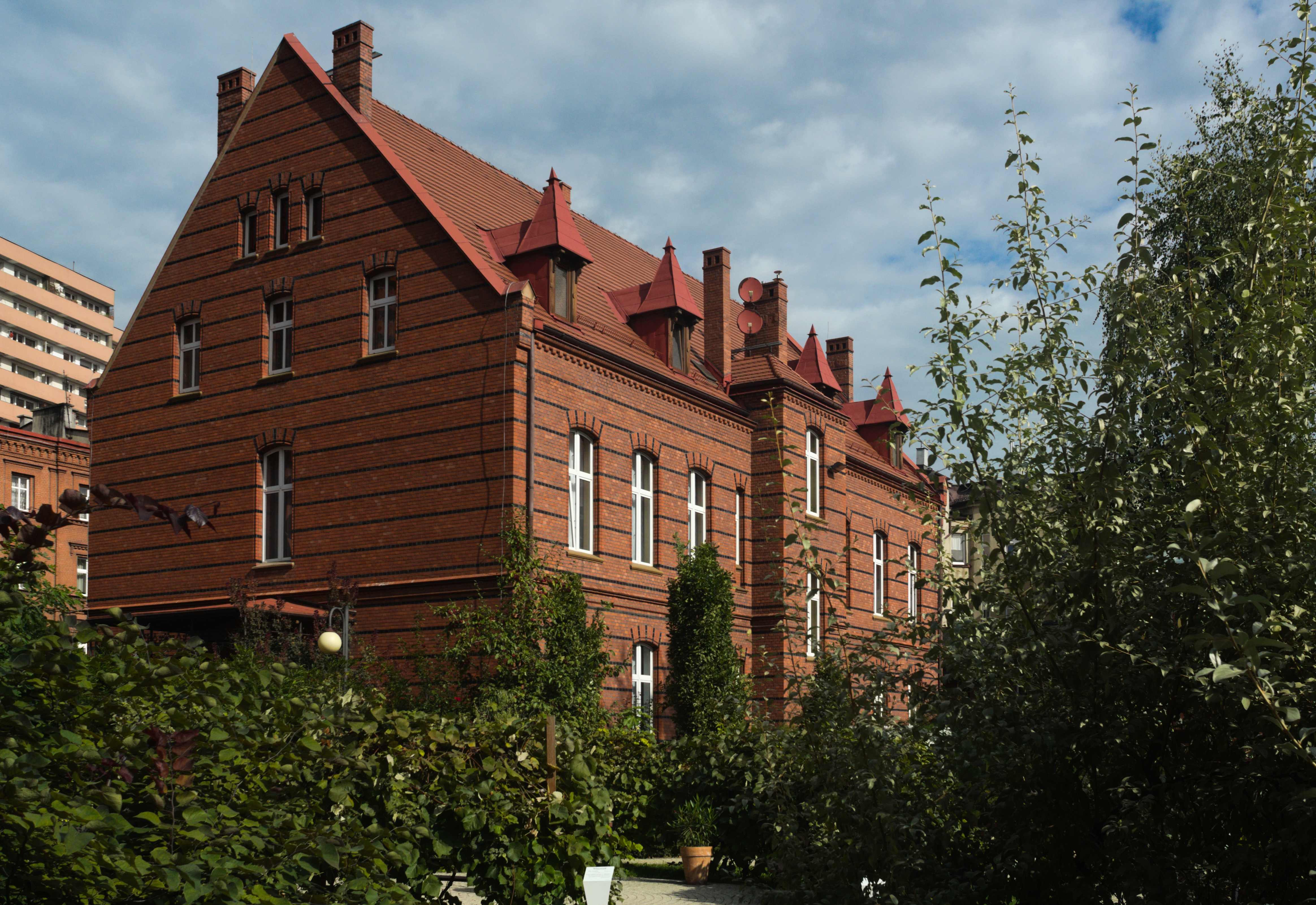 budynek probostwa parafii św. Jadwigi w Chorzowie z 1893 roku, projektant Paul Jackisch, zabytek nieruchomy nr A/241/09 z 25.05.2009